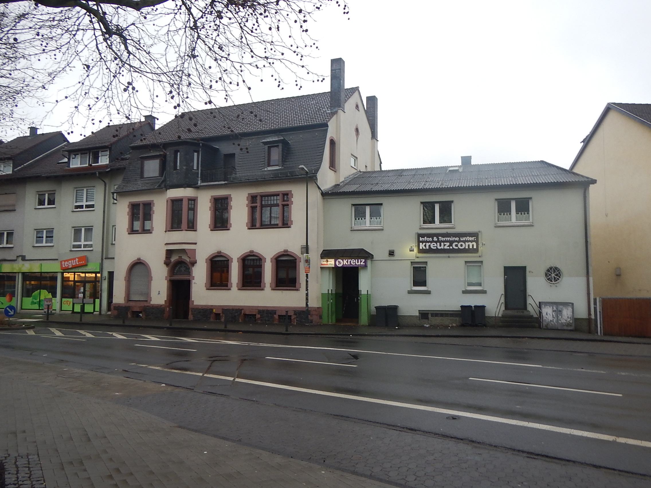 Vorderseite des KUZ Kreuz in Fulda